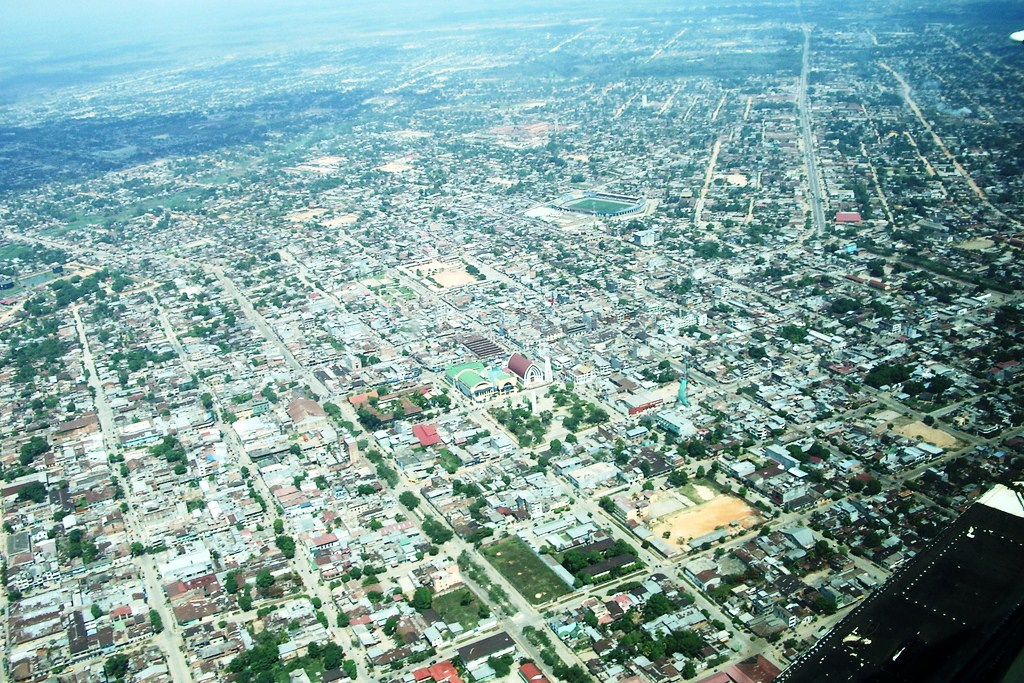 Observación aérea del centro urbano de Pucallpa hacia el suroeste.